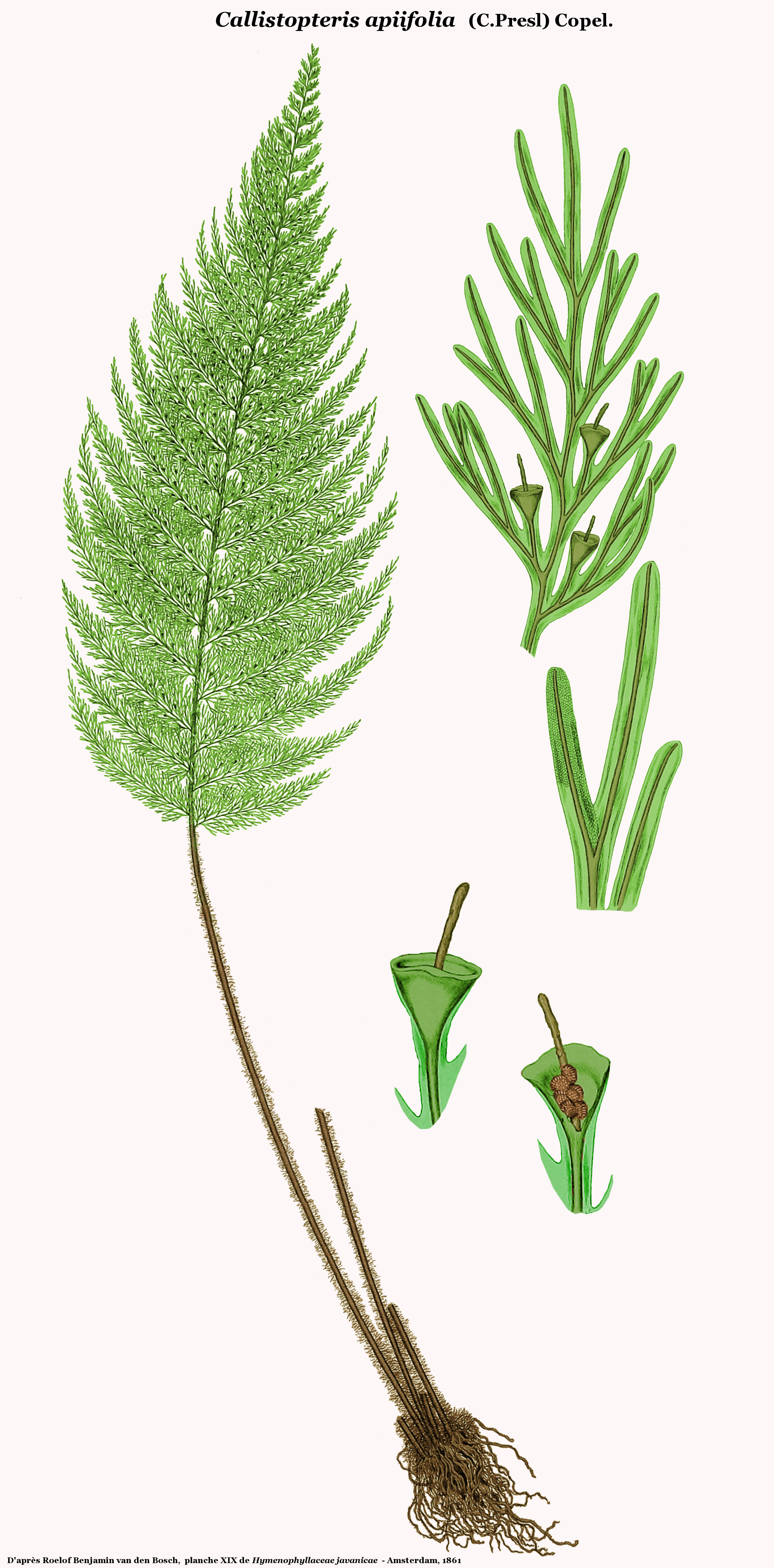 Callistopteris apiifolia - D'après la planche XIX de Roelof Benjamin van den Bosch - Hymenophyllaceae javanicae - Amsterdam, 1861 - Planche reprise sous Gimp par D. Prévôt